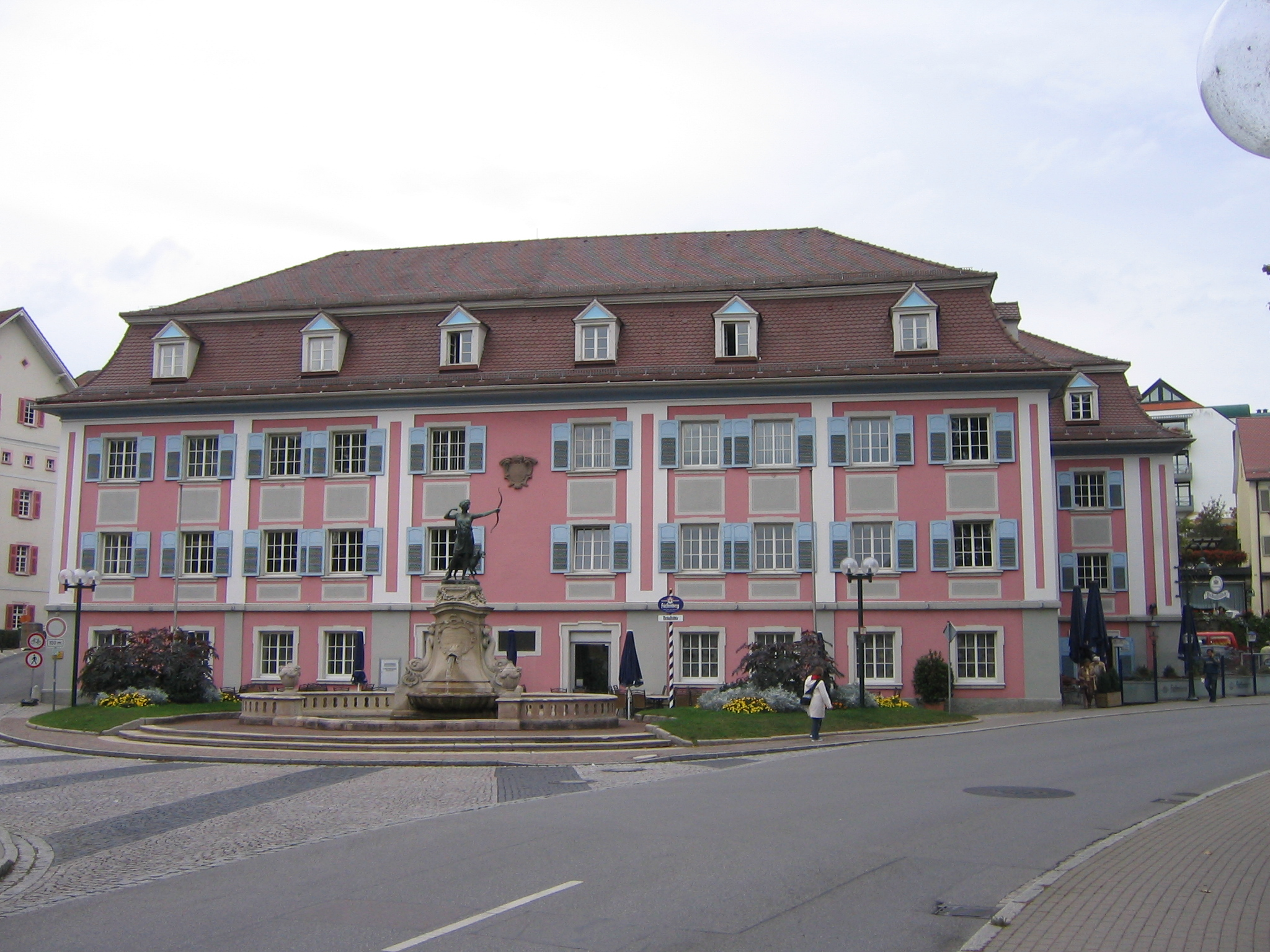 Bräustüble der Brauerei Fürstenberg in Donaueschingen